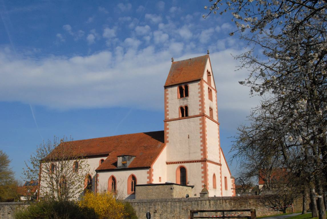 Bad Neustadt-Brendlorenzen, Pfarrkirche St. Johannes Baptista